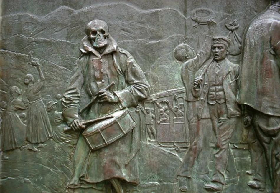 Kriegerdenkmal-Relief von Curt Liebich